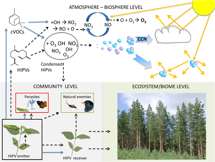 Fonctions et devenirs des COV à trois niveaux : communauté, écosystème/biome et atmosphère-biosphère. Légende : CCN = cloud condensation nuclei (CCN), noyaux de condensation de nuages ; cVOCs = condensed VOC, composés organiques volatils (COV) condensés ; HIPV = Herbivore-induced plant volatiles.